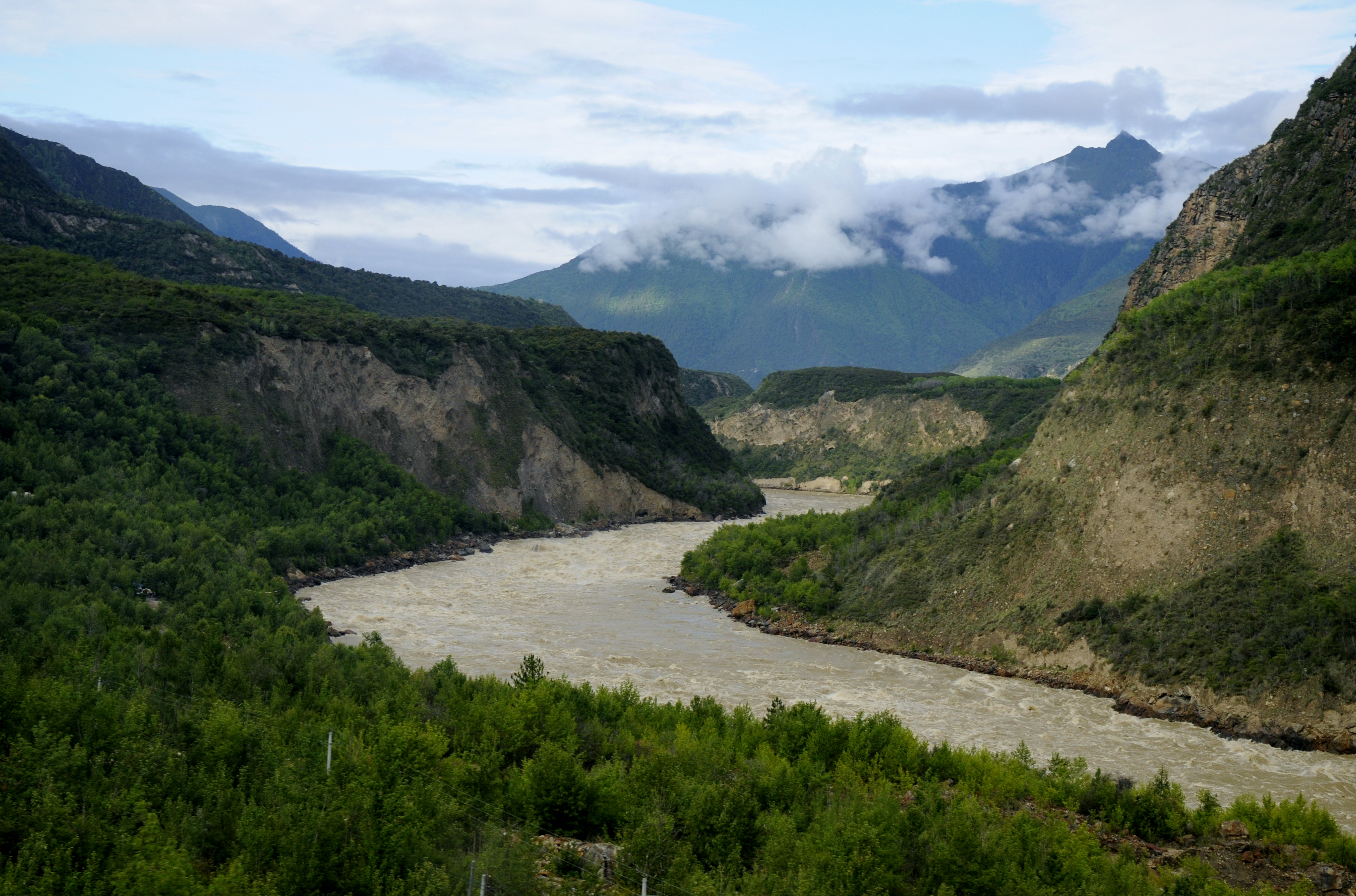 雅鲁藏布大峡谷